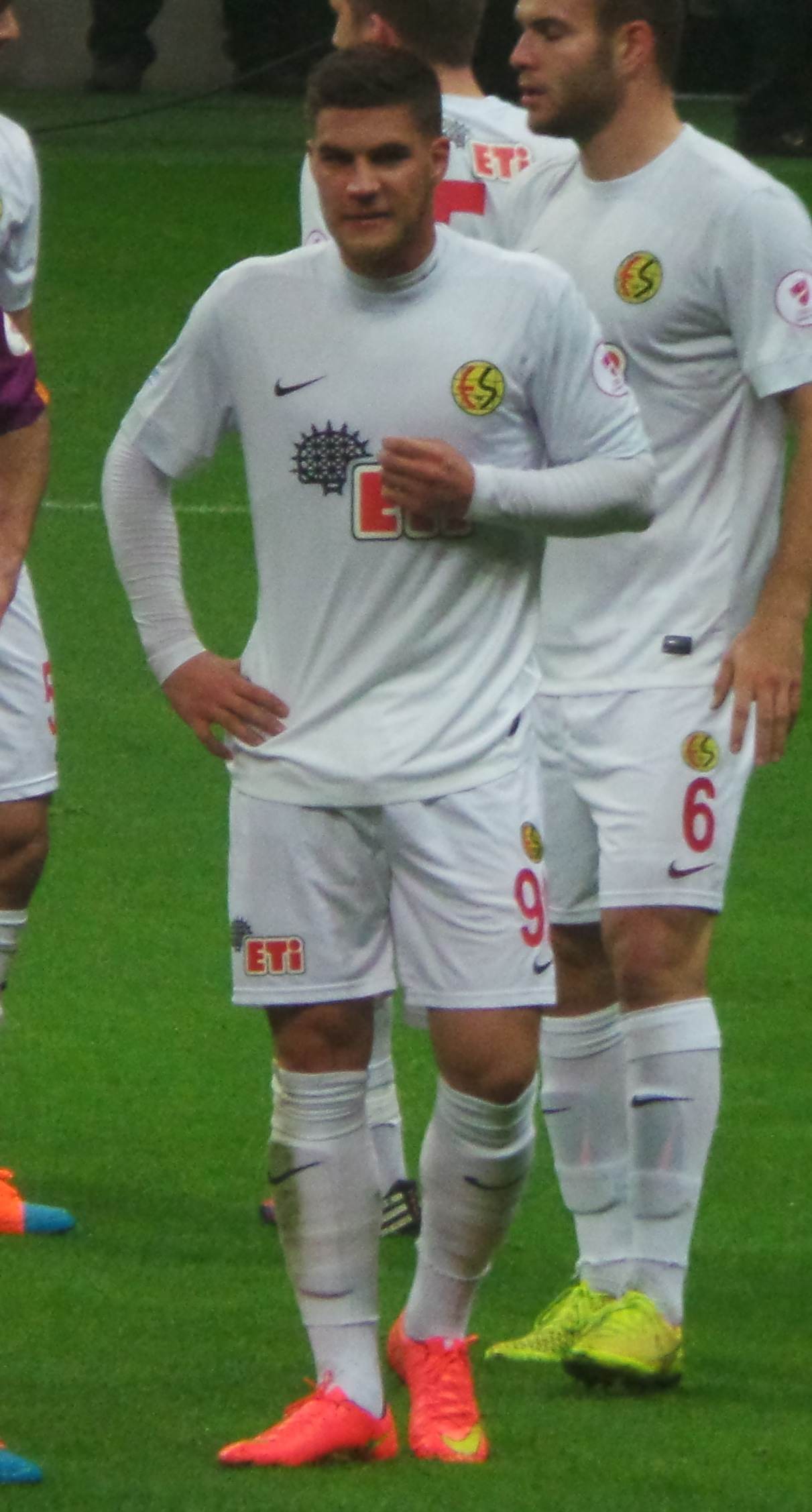 Andaç Güleryüz